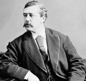 Stephen Tobin, M.P., Halifax, N.S.